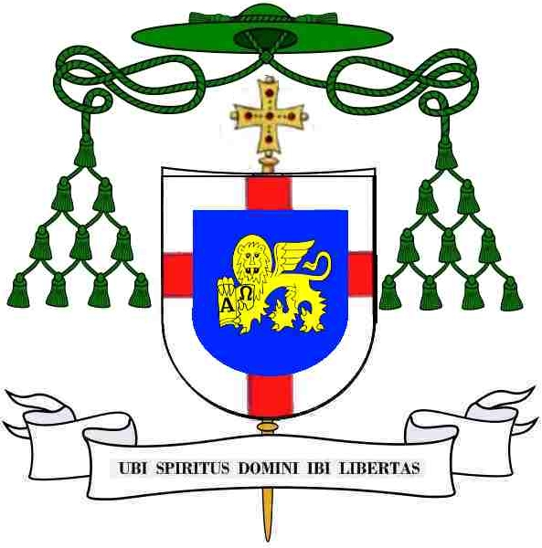 Wappen Reinhard Marx, Bischof von Trier (2001-2007)